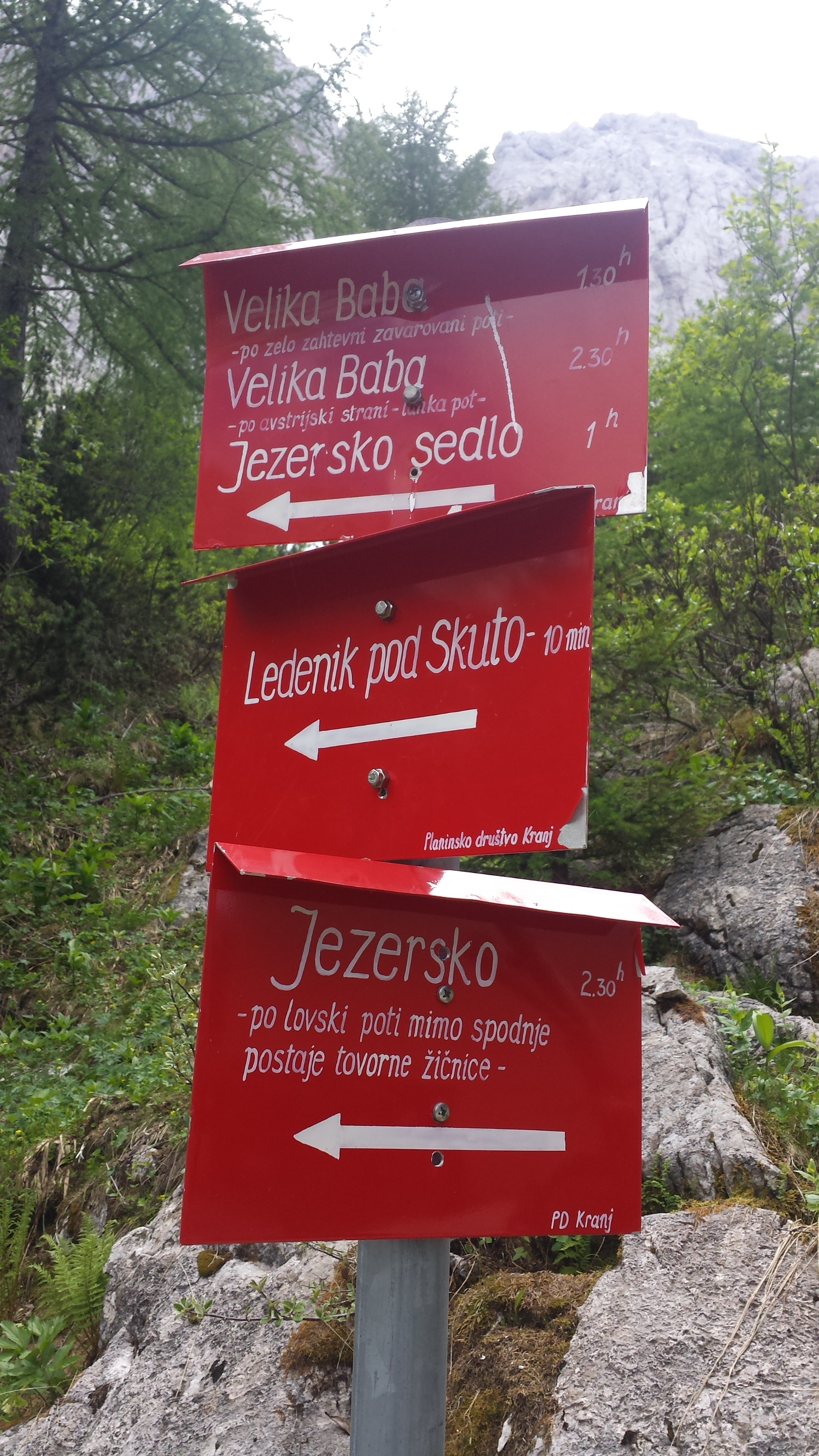 Kranjska koča na Ledinah 1869 m. n. m. Jezersko, Slovenija Smerokazi pri koči